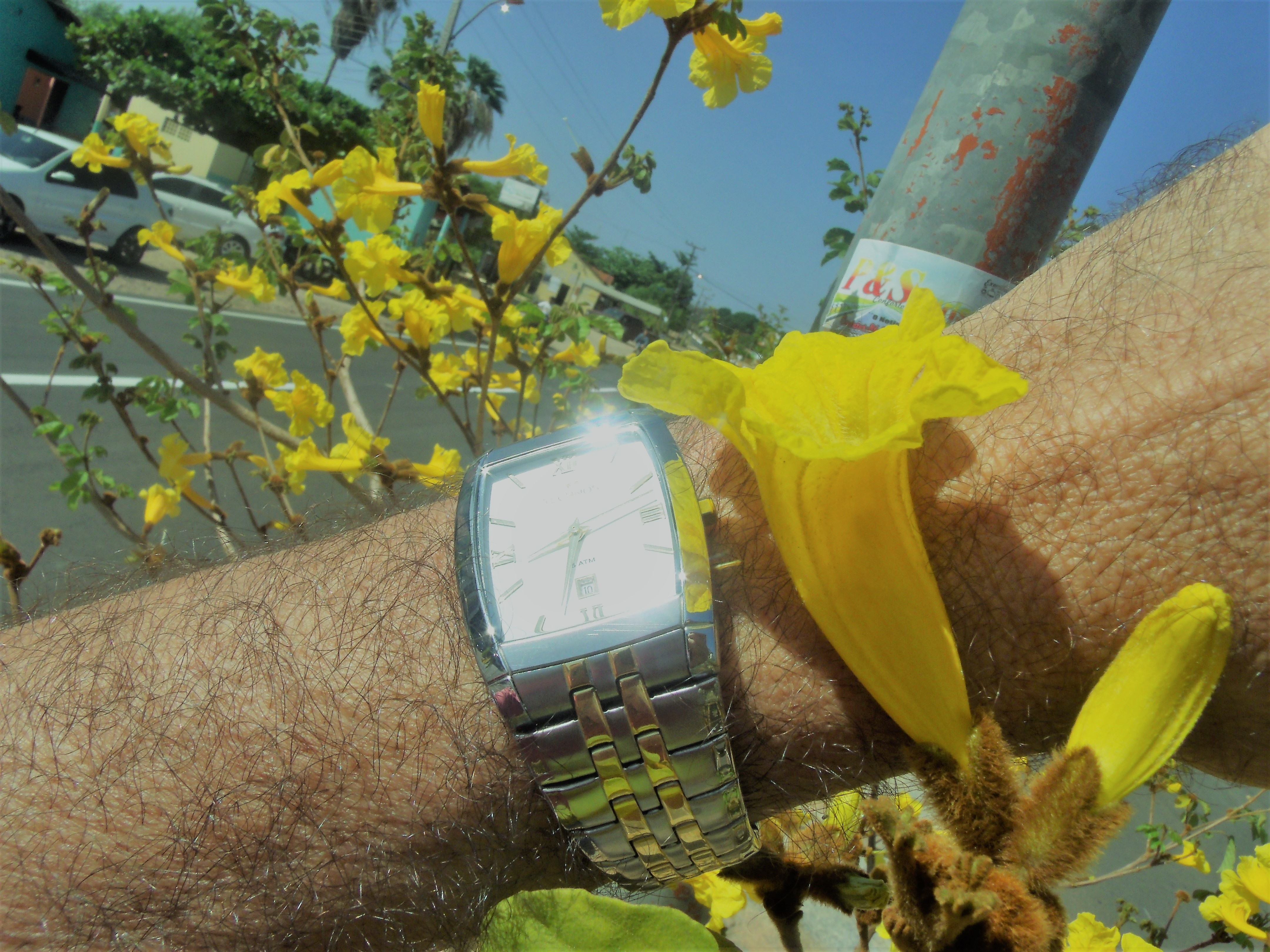 Relógio em braço peludo em flores de Ipê.